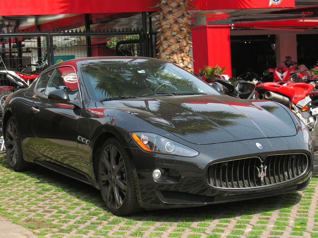 Maserati Gran Turismo S 2011